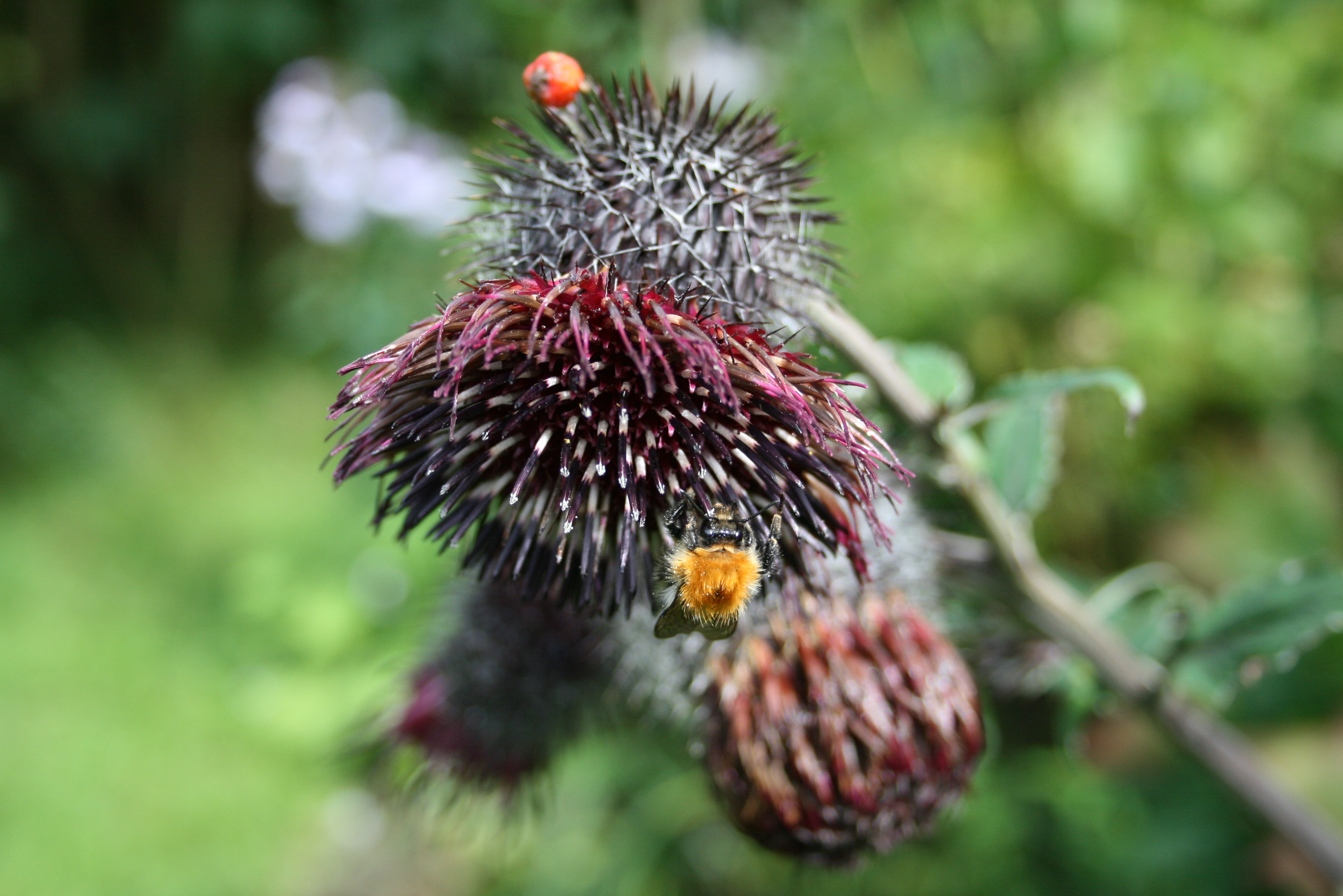 Synurus deltoides